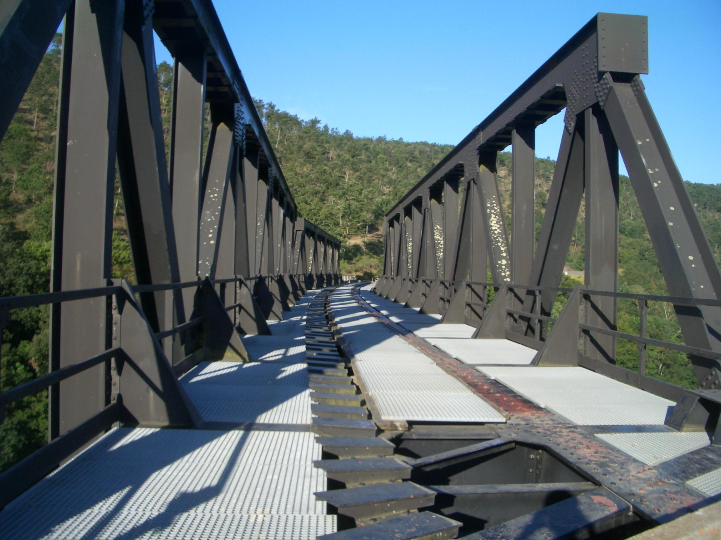 Le travate in acciaio del viadotto sul Mignone